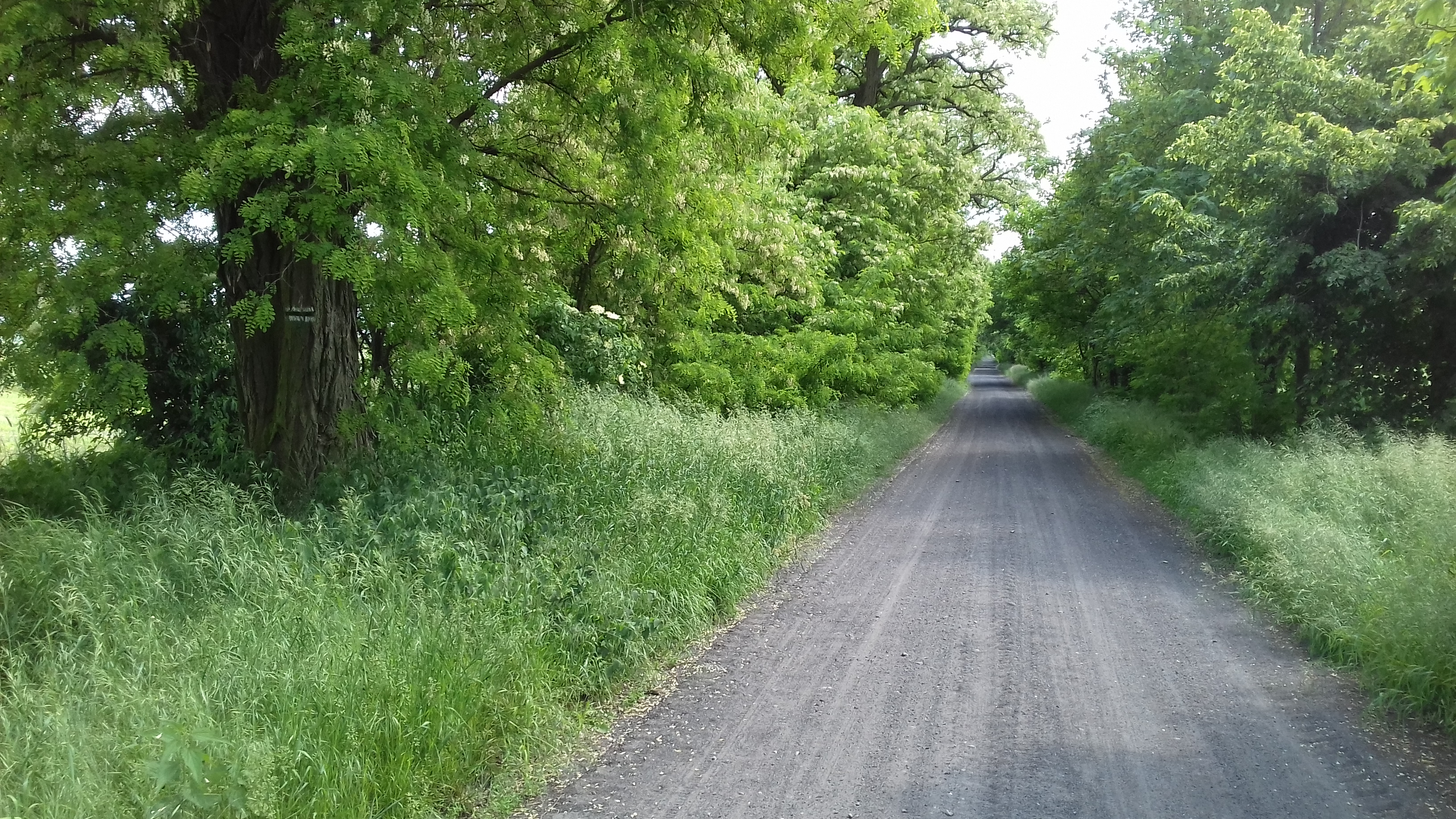 Szlak pieszy nr 3590 (czarny) na odcinku Rosnówko-Trzebaw